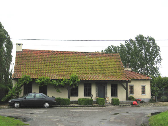 Aaltervoetweg_6